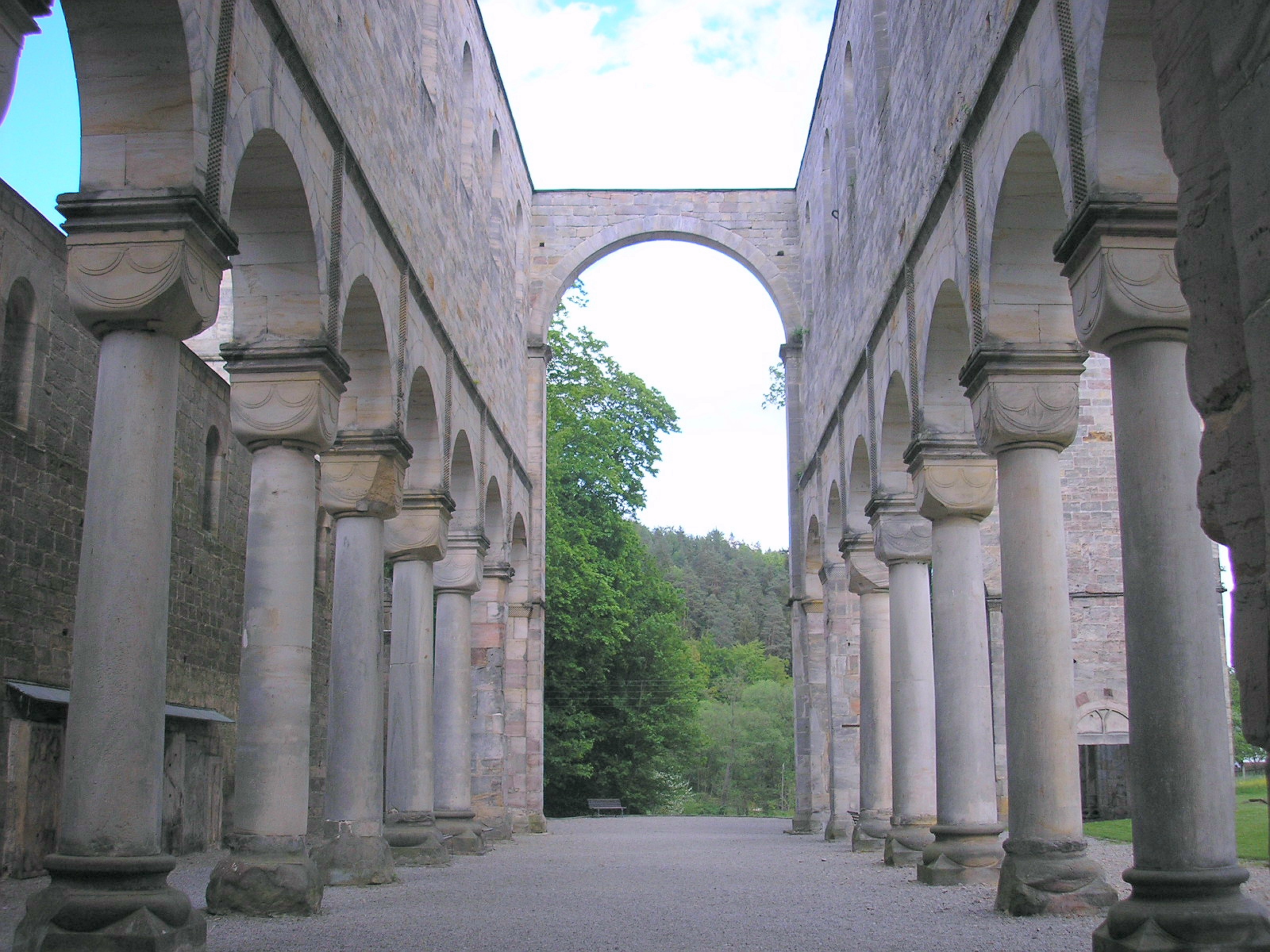 Im ehemaligen Kirchenschiff der Klosterruine Paulinzella (Thüringen).